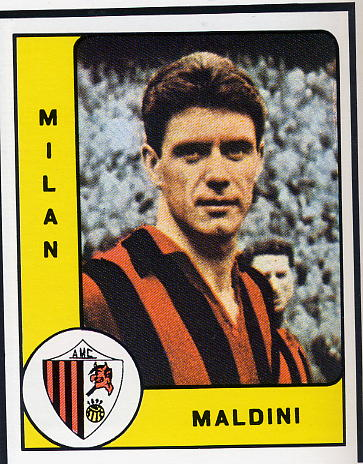 Cesare Maldini che indossa la maglia del MIlan